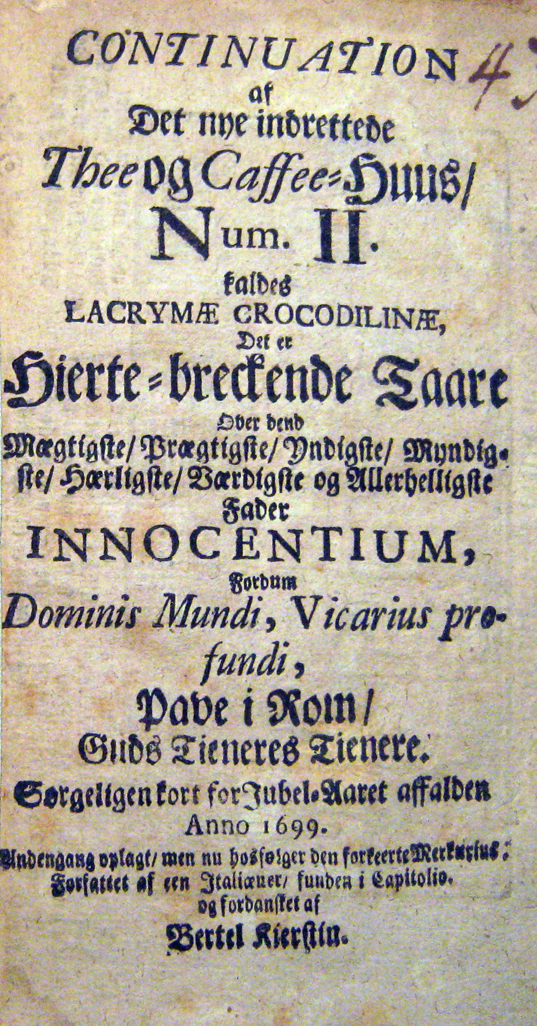 Titelbladet til nr. 2 af P.J. Phønixbergs tidsskrift Det nye indrettede Thee- og Caffee-Huus fra 1726.